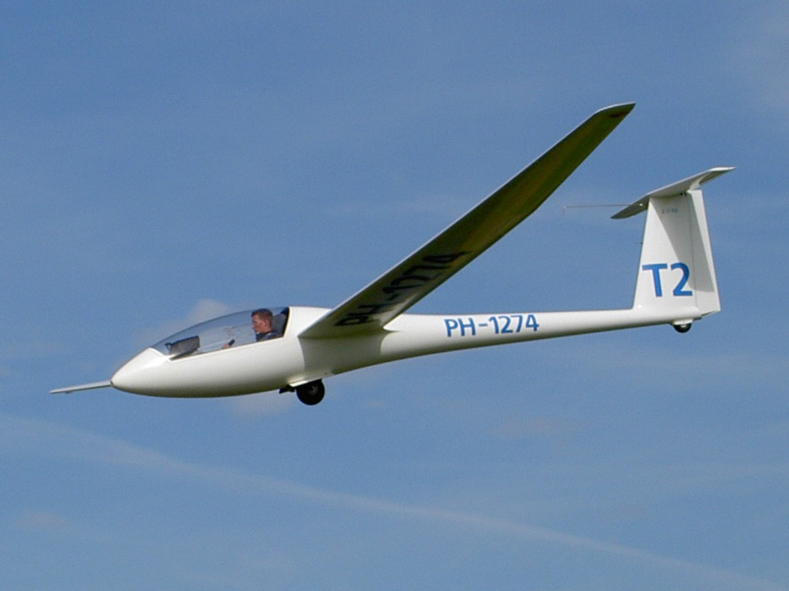 PH-1274 Rolladen-Schneider LS-4b at Teuge